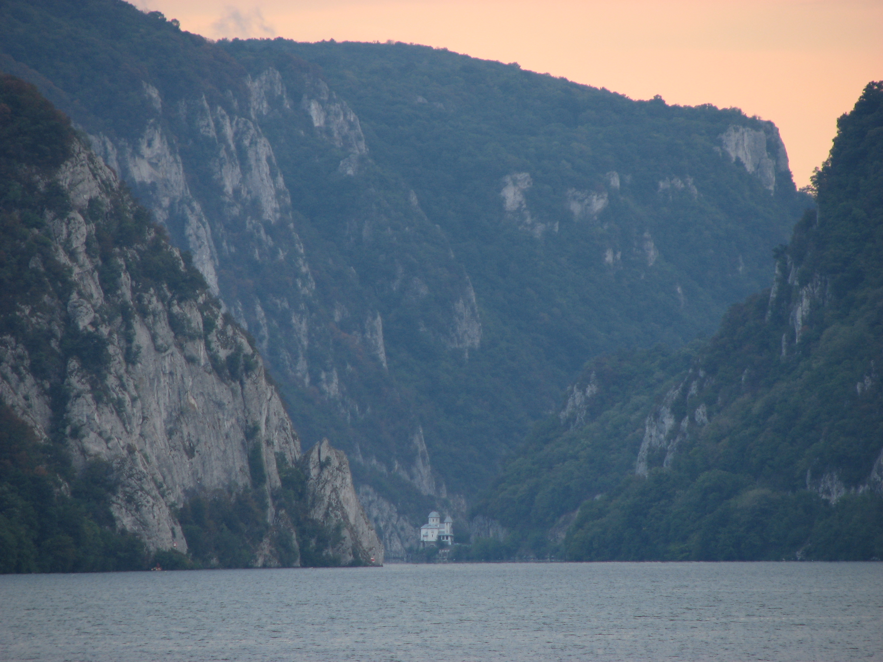 Evening at Danube gorge